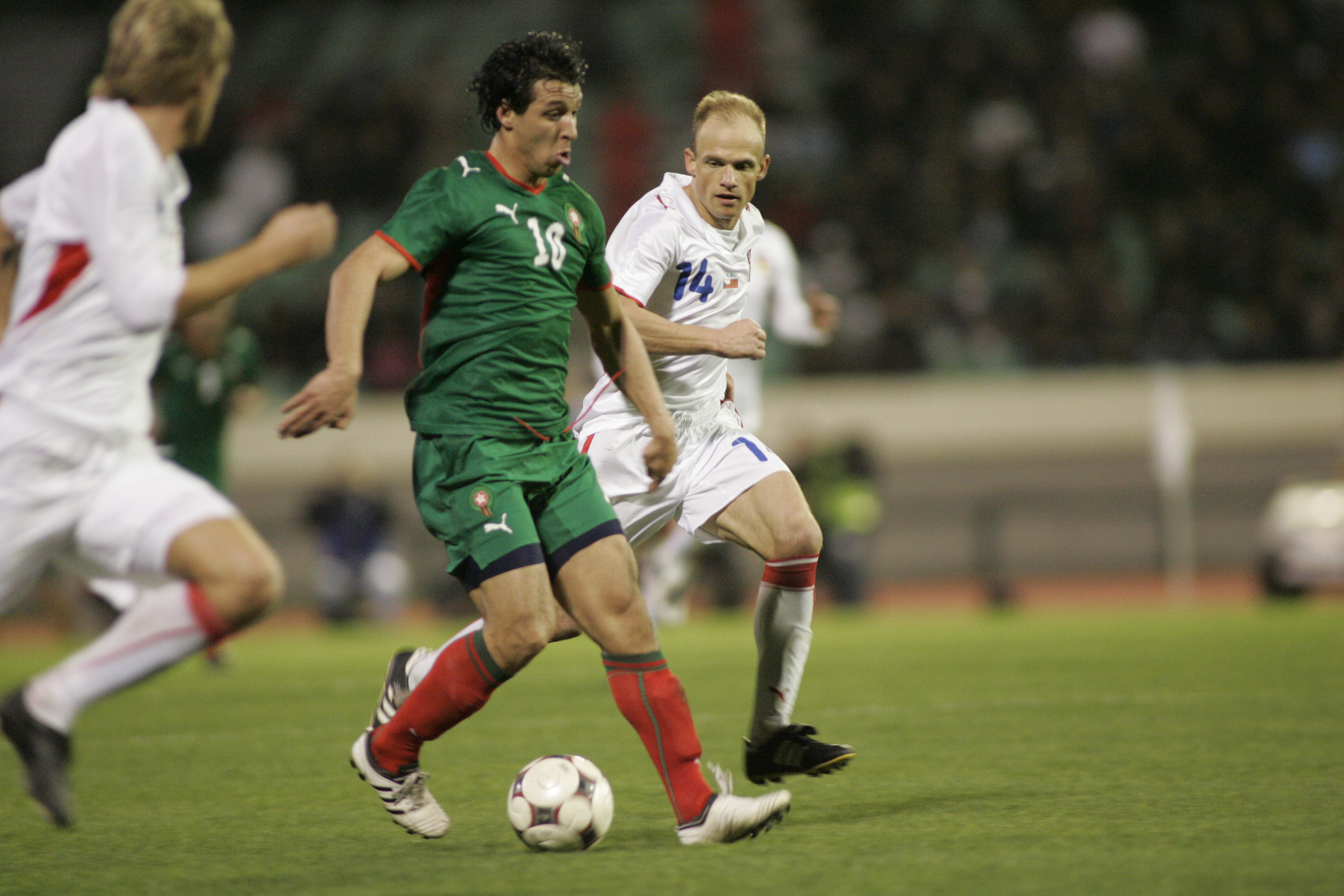 Mounir el Hamdaoui, David Jarolim